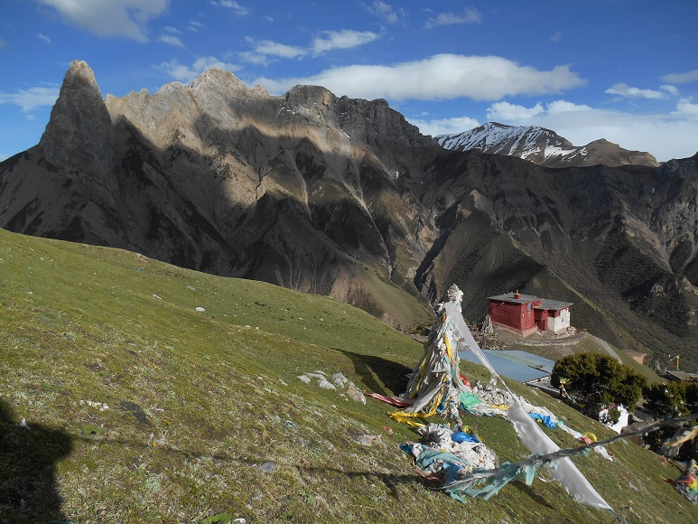 Umgebung des Tana-Klosters